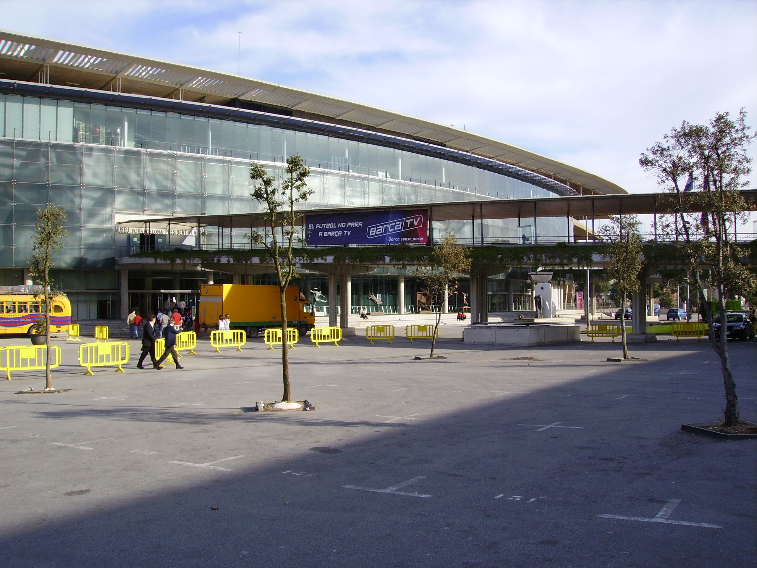 Exterior Tribuna Camp Nou,FC Barcelona,Barcelona,Catalunya